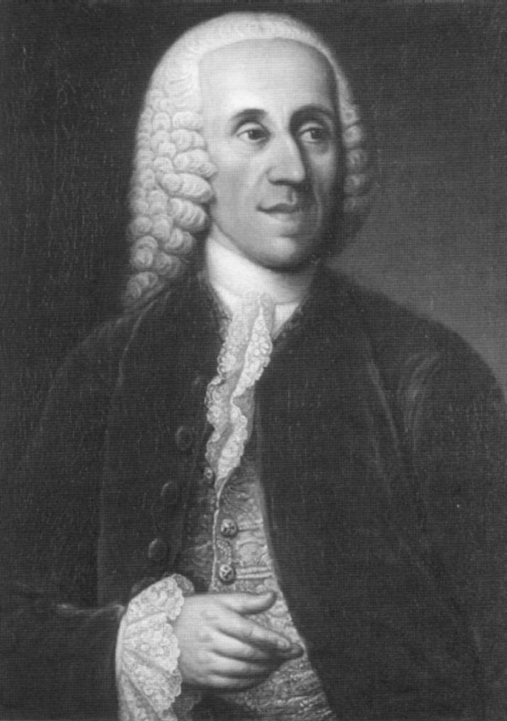 Der Leipziger Bürgermeister Rudolph August Schubart (* 1694; † 1770) auf einem Gemälde von Elias Gottlob Haußmann von 1760.